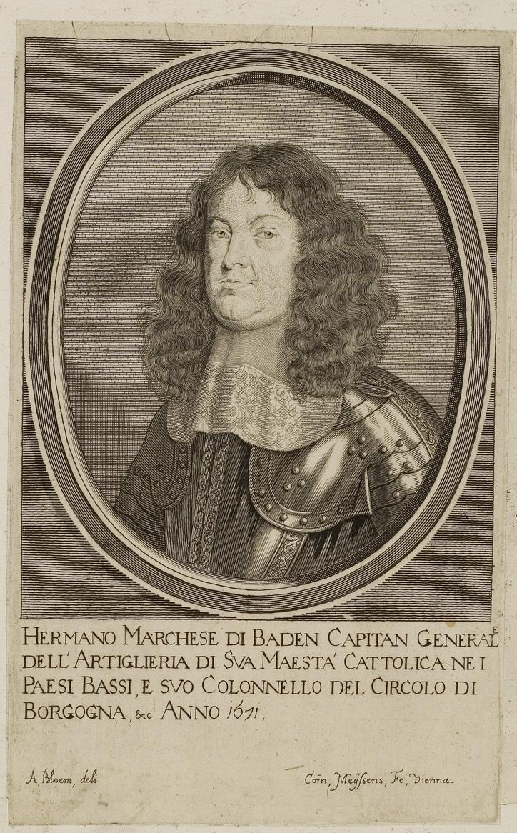 Grafik aus dem Klebeband Nr. 1 der Fürstlich Waldeckschen Hofbibliothek Arolsen Motiv: Hermann Markgraf von Baden-Baden, Militär und Diplomat in kaiserlichen Diensten A. Bloem (deli); Cor. Meÿssens (Fe.)